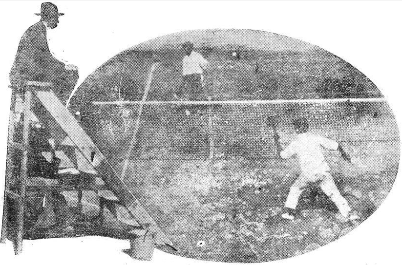 1923년 전국체육대회 정구(제3회 전조선정구대회) 종목 결승 경기 모습.